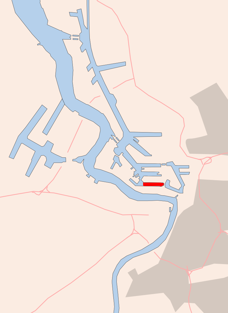 Antwerp , 5e havendok